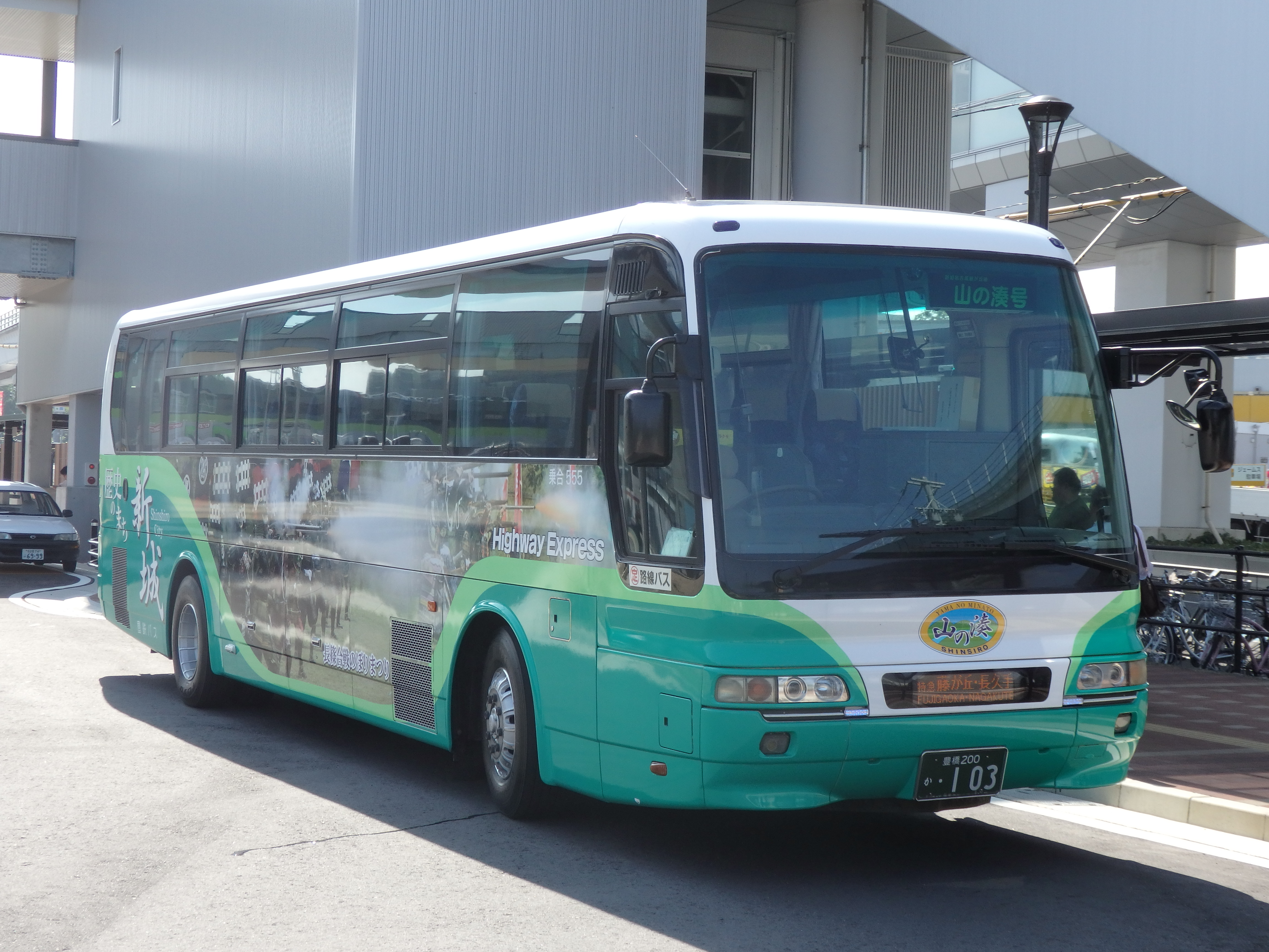 山の湊号専用車555号